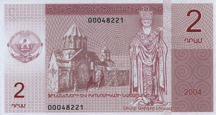 2 Dram